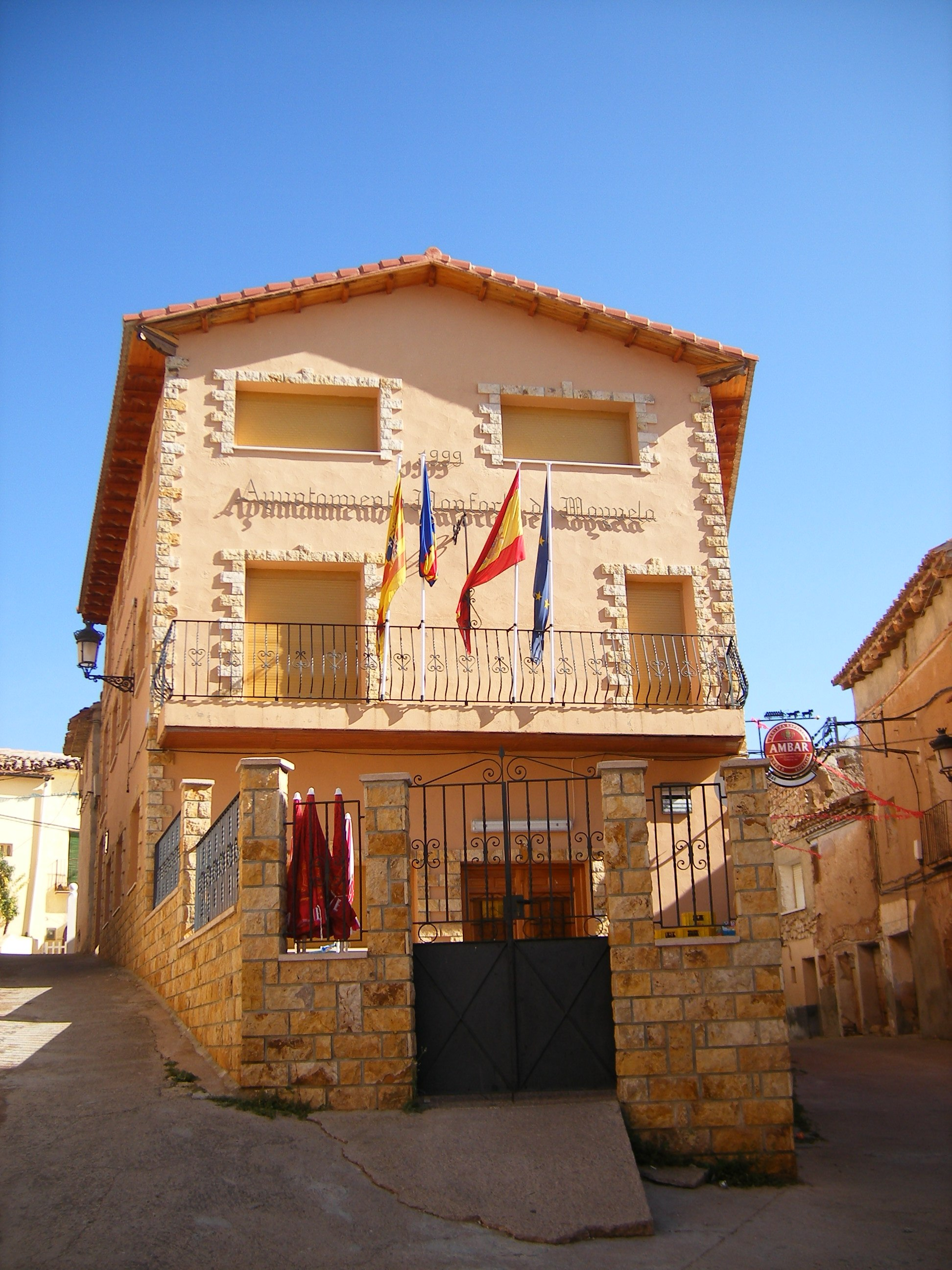 Nuevo Ayuntamiento (1999) de Monforte (Aragón).